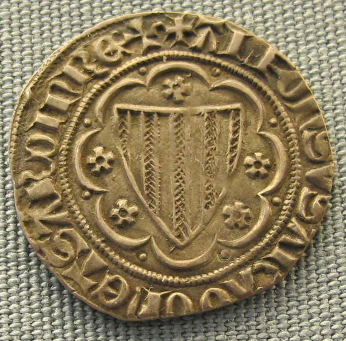 Iglesias, reale (grosso alfonsino)di alfonso IV d'aragona, 1327-1336